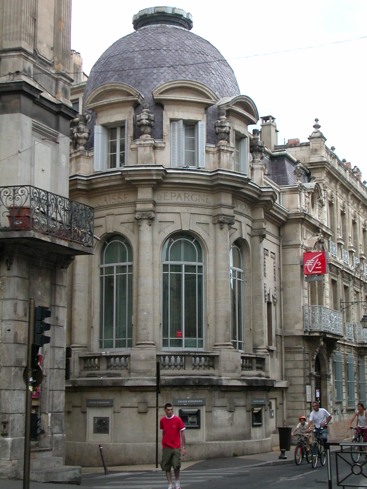 Immeuble de la Caisse d'épargne, rue Joseph Vernet à Avignon